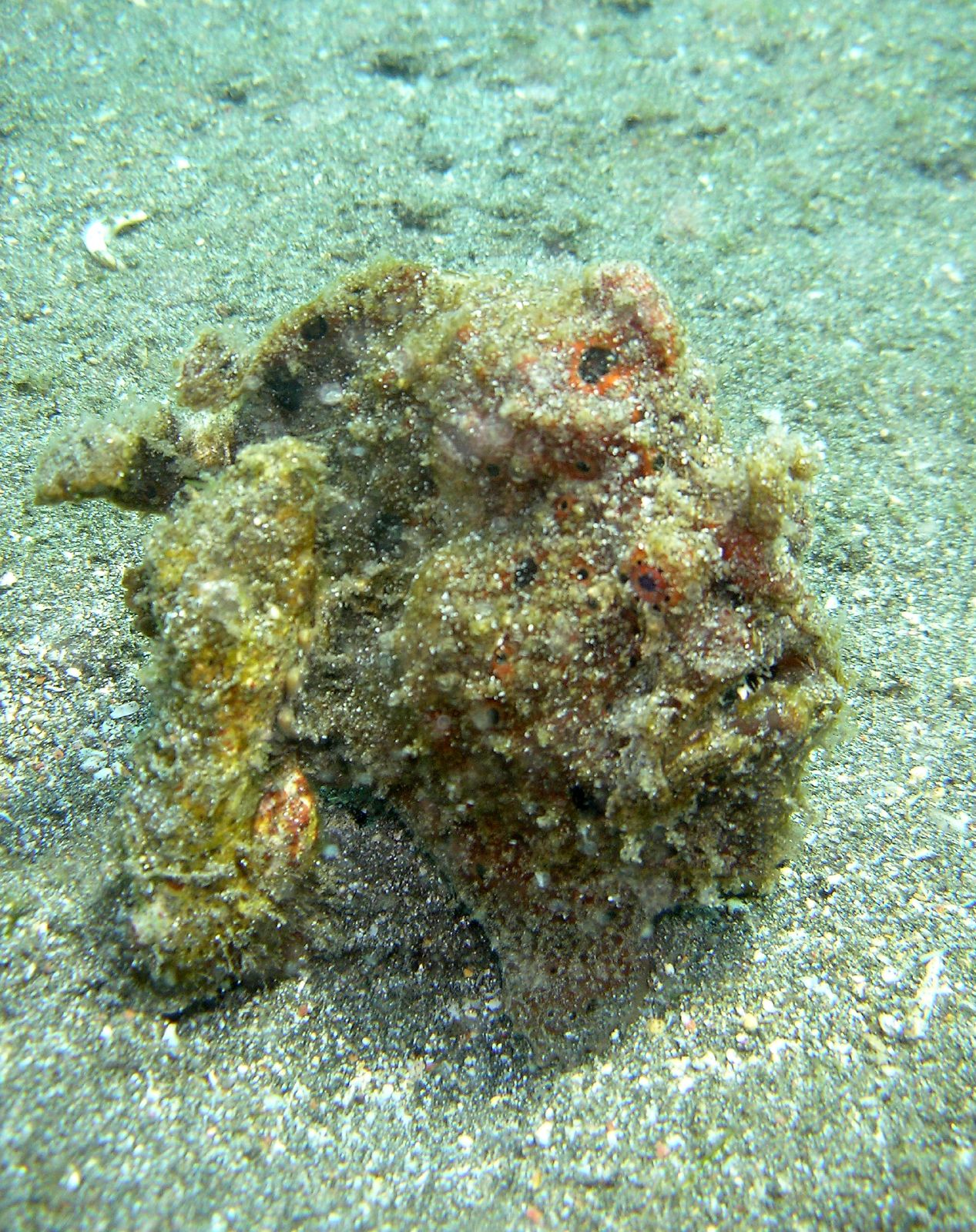 Frogfish